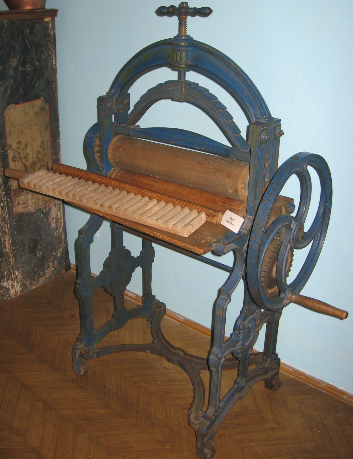 maglownica (na blacie) i magiel na korbę, ze zbiorów Muzeum Gospodarstwa Domowego w Ziębicach